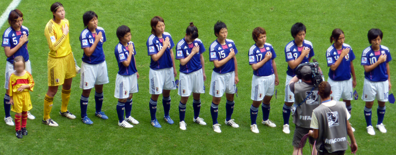 FIFA U-20-Weltmeisterschaft der Frauen 2010, Japanische Nationalmannschaft, Spiel 14 in Augsburg